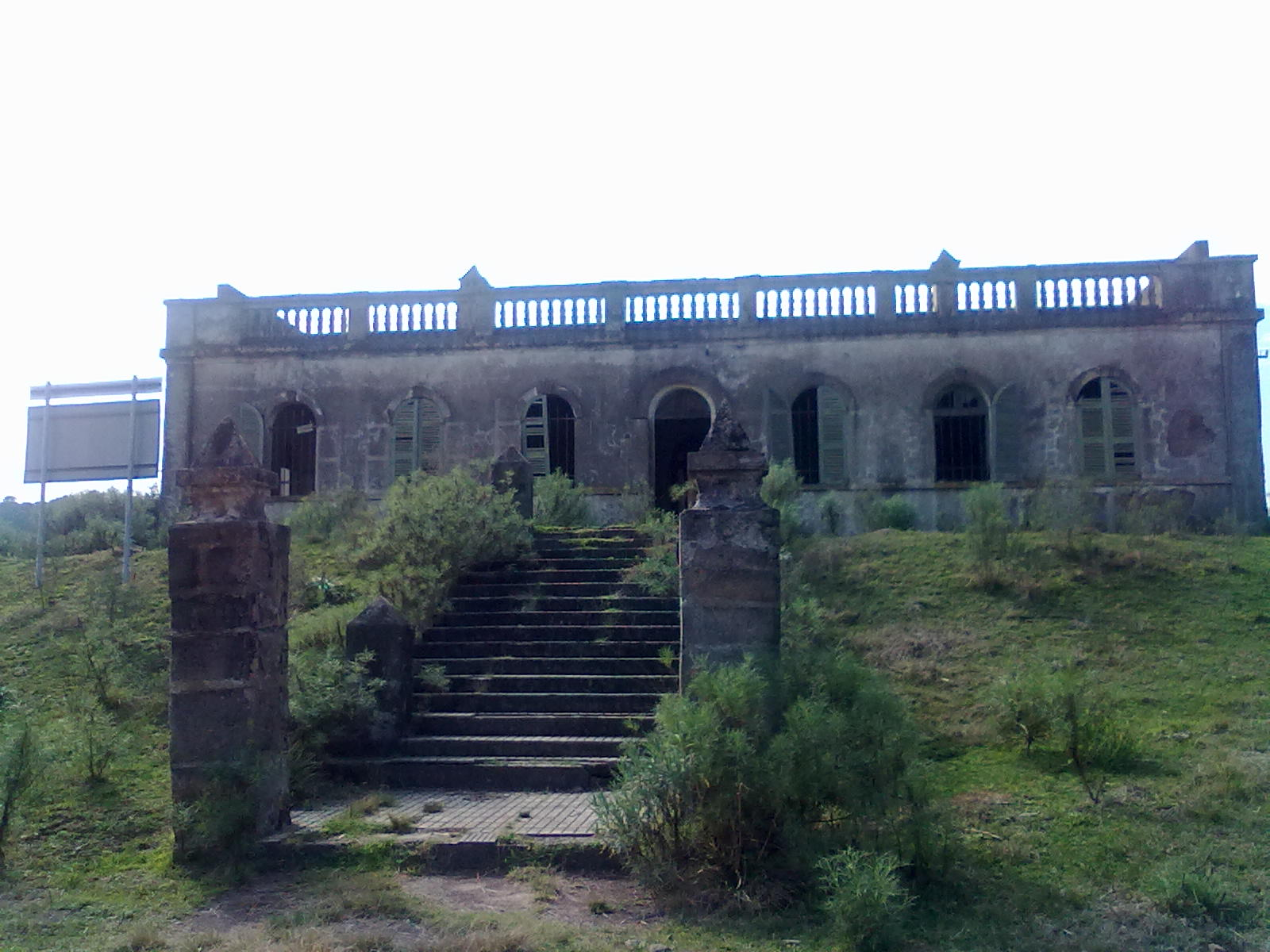 Edificio donde se encontraban las oficinas de administración de la represa.